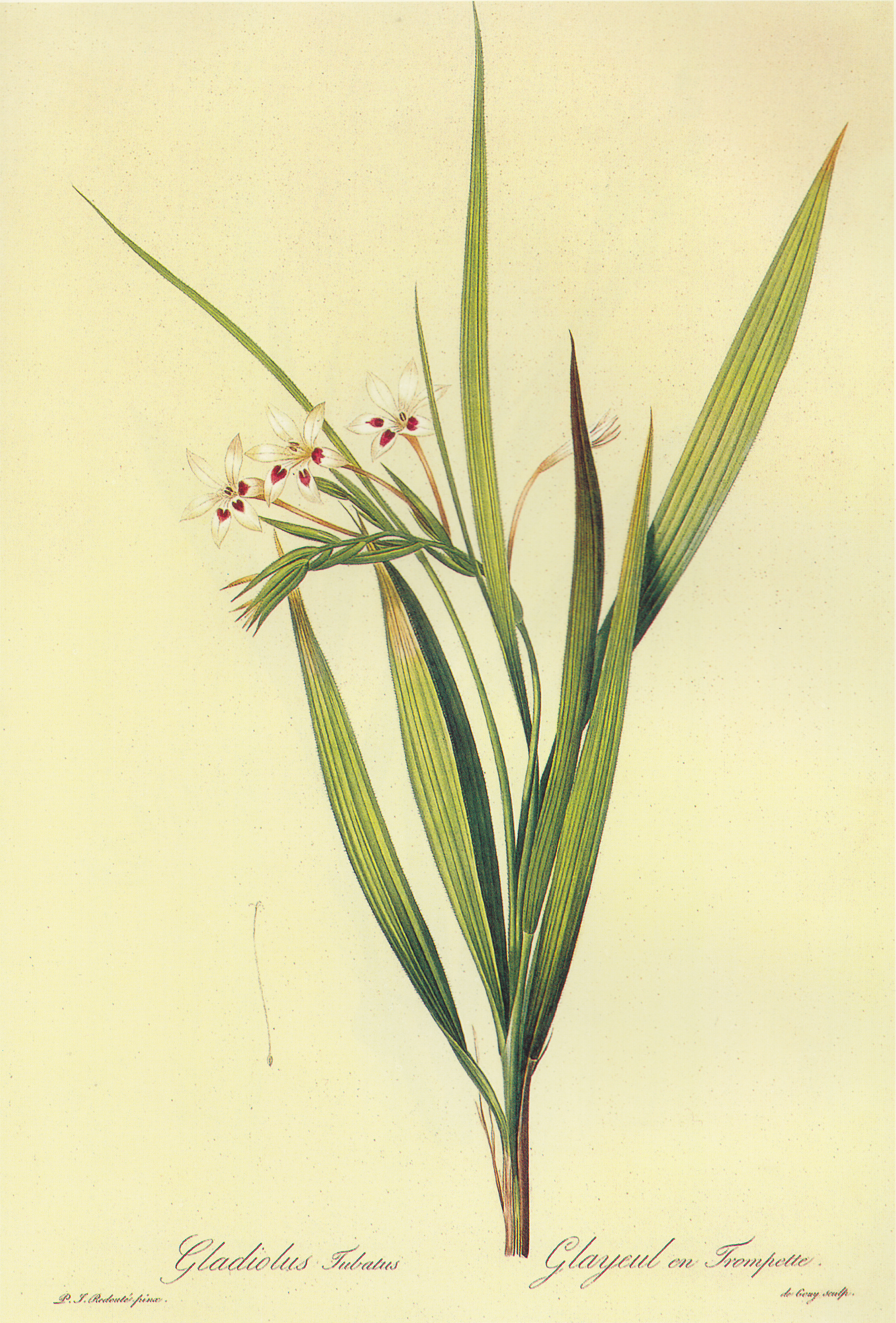 长颈狒狒花。原产于南非。